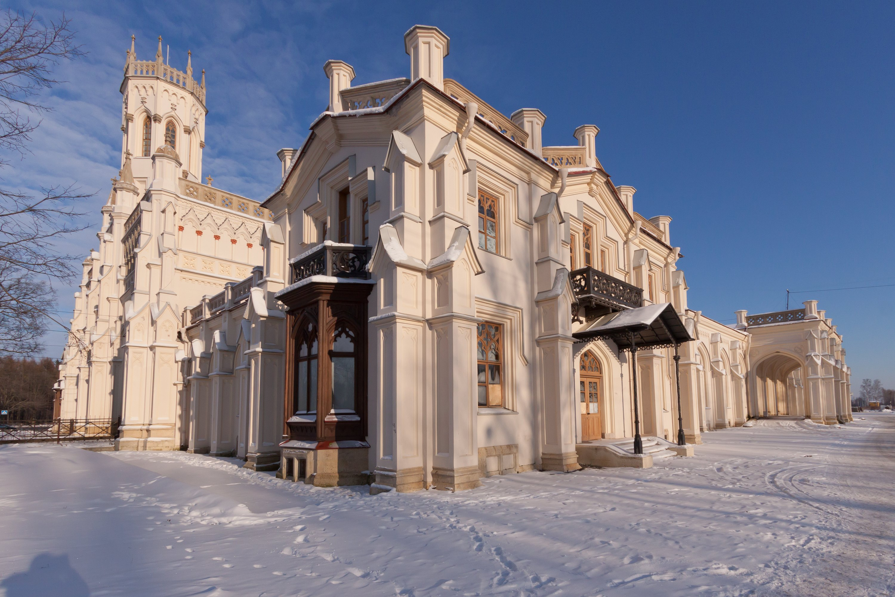 Вокзал железнодорожной станции «Новый Петергоф» (Санкт-Петербург и Лен.область, Петергоф, ж. -д. ст. "Новый Петергоф")